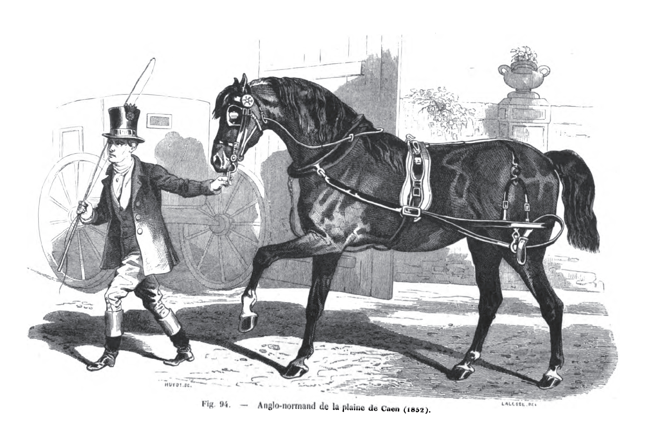 Anglo-Norman